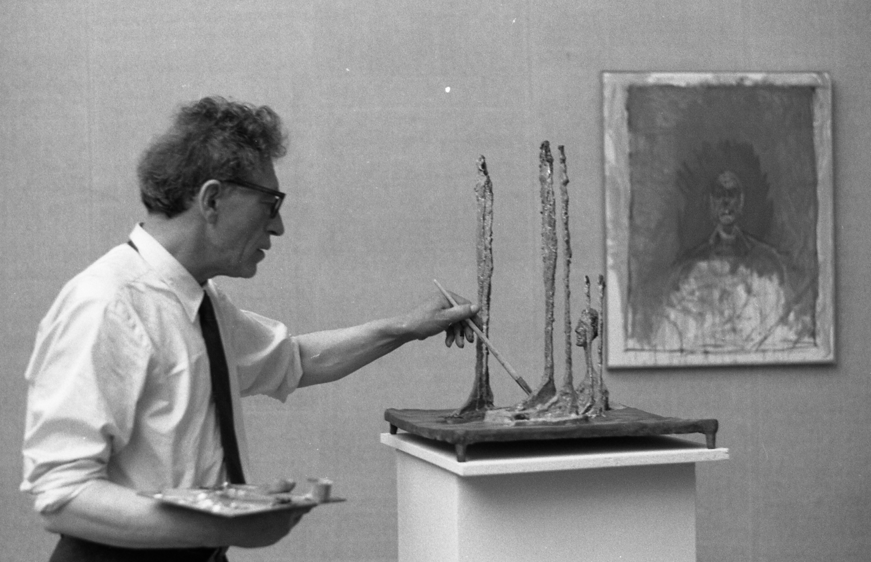 Servizio fotografico : Venezia, 1962 / Paolo Monti. - Strisce: 6, Fotogrammi complessivi: 36 : Negativo b/n, gelatina bromuro d'argento/ pellicola ; 35 mm. - ((I fotogrammi hanno una doppia numerazione. . - Sul portanegativi: Pentax HP3. - Sul dorso del portanegativi Monti specifica: "Viganò (Gorki) Pomodoro G. - opere; Milani - sala; Giacometti - opere; Sala Dova; opere Broggini". - Nell'agenda di lavoro citata in fonti e documenti Monti specifica: "2-3-7-8-9 sculture Giacometi; 10-11-12 Ritratti Giacometti; 13/16 sculture A-Martini + 36 e 37; 17/20 sculture Milani; 21/23 sculture broggini; 24/25 Sala Dova con autore e persone; 30/32 sculture Mascherini". - Occasione: Documentazione della Biennale di Venezia del 1962. - Fonte: Agenda di Paolo Monti: Foto Leica 1 / 1-51 verde, 1-110 nera (1958-1963), presso Archivio Paolo Monti